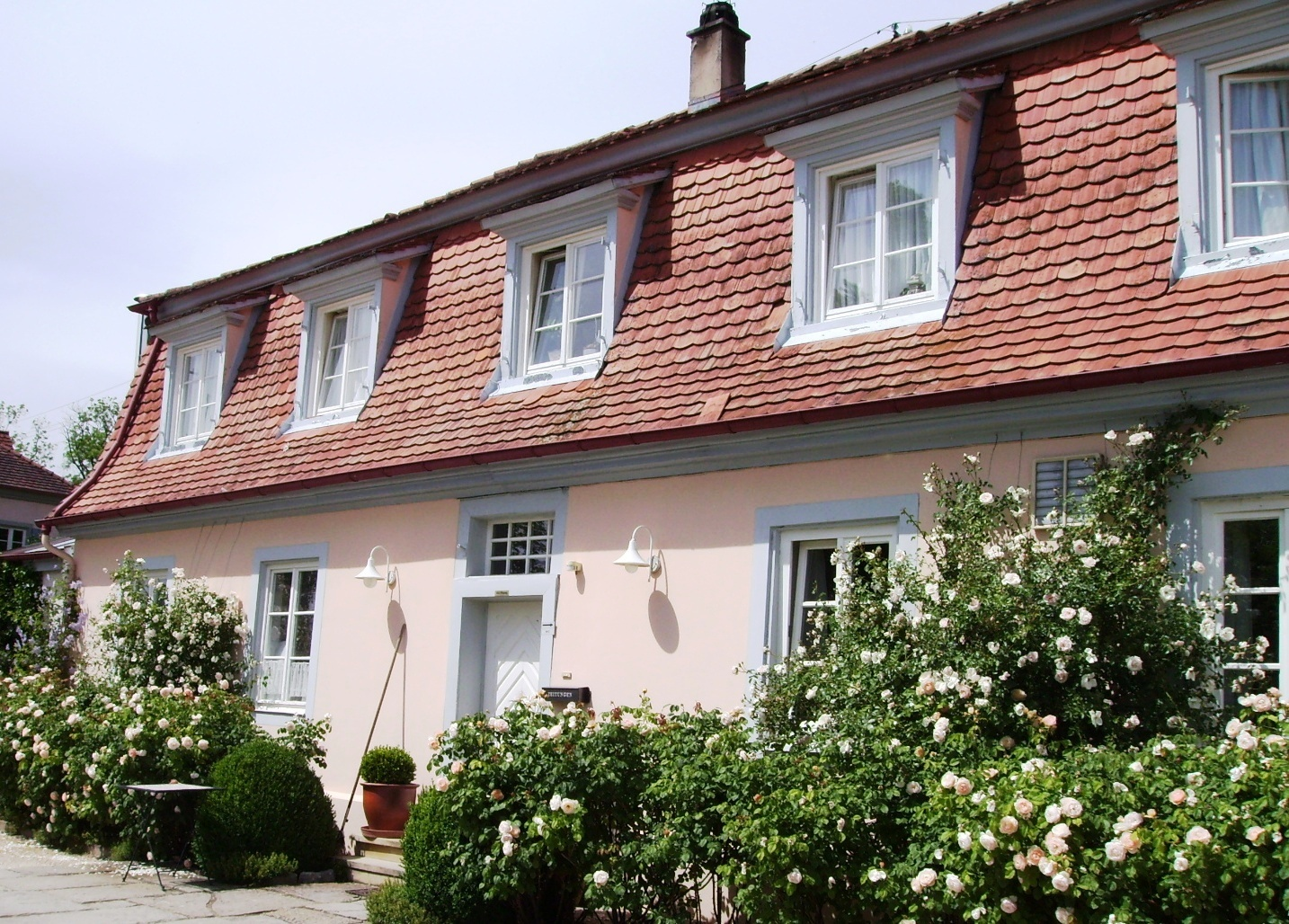 Hechingen, Germany